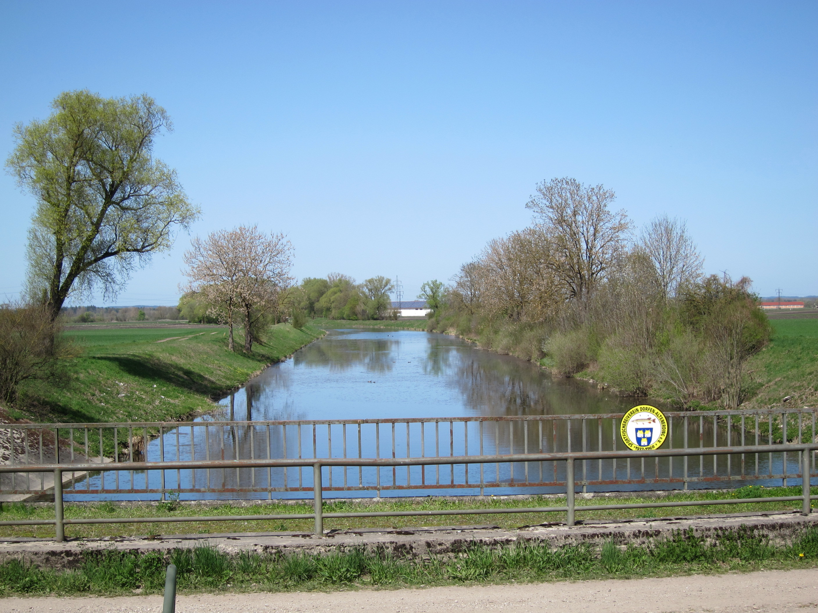 Sempt-Flutkanal nach der Unterführung unter dem Mittlere-Isar-Kanal